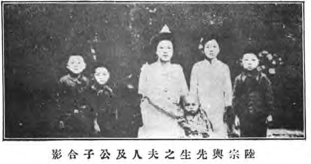 治家全書圖像